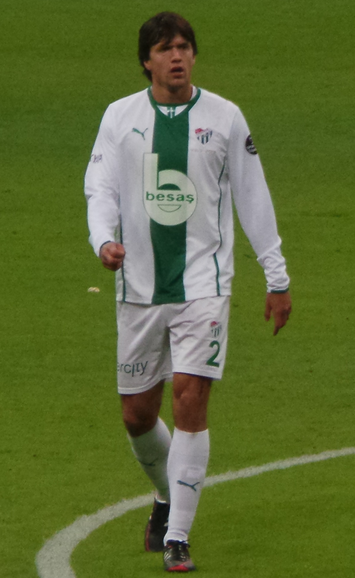 Renato Civelli against Galatasaray which they lost 6-0